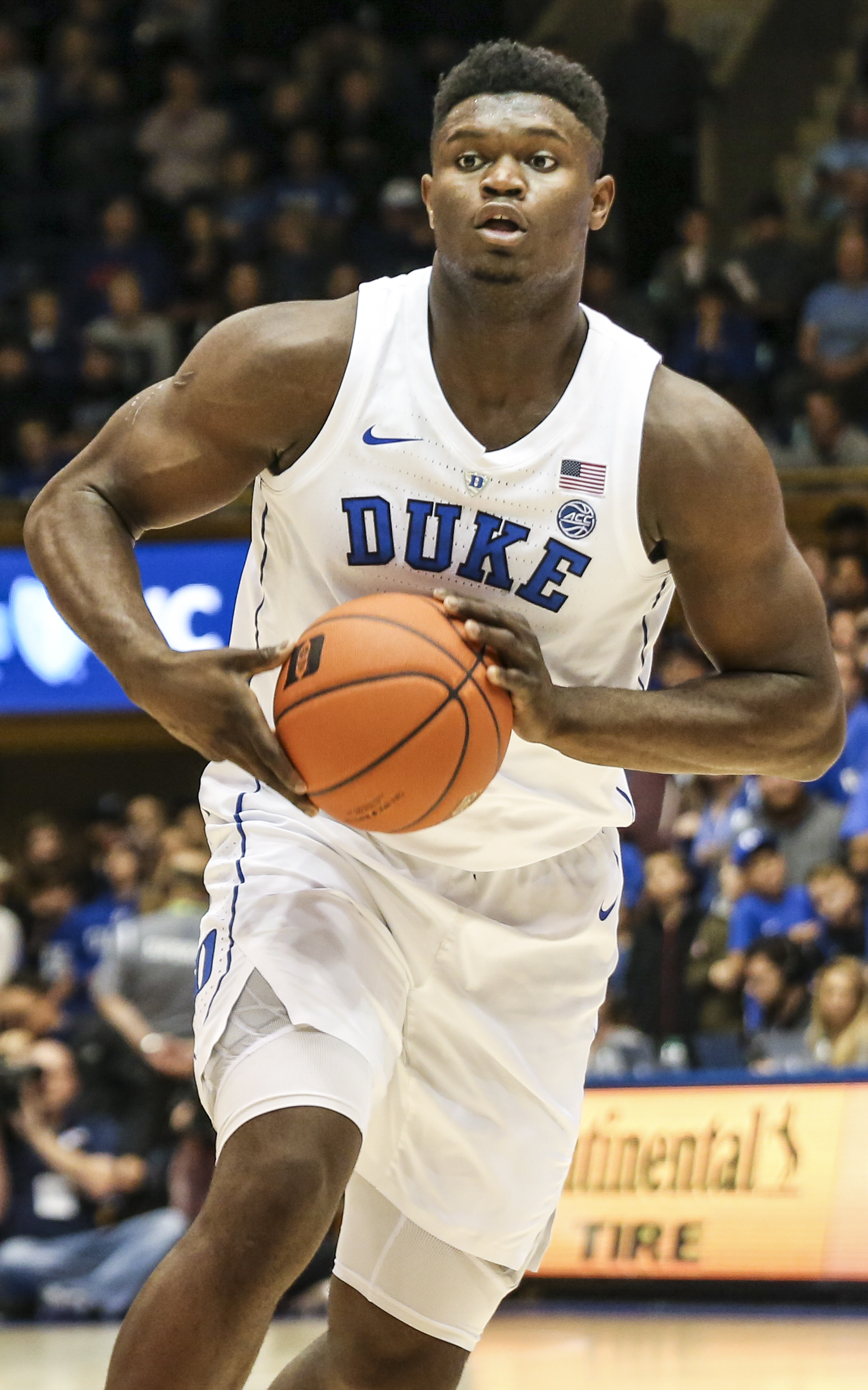 3B7A6197